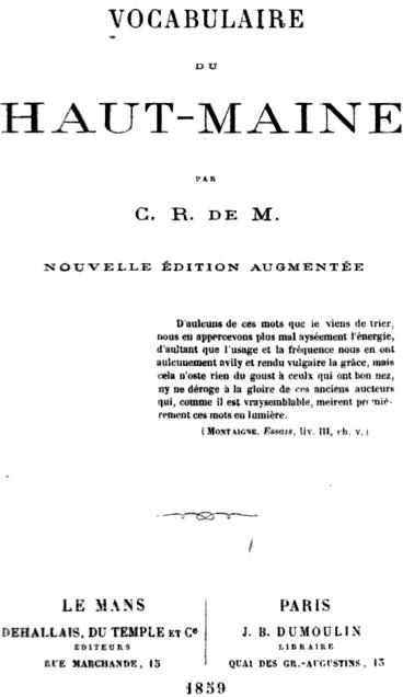 La couverture de l'oeuvre de Charles Raoul de Montesson, Vocabulaire du Haut Maine. Ici, la deuxième édition datant de 1859.